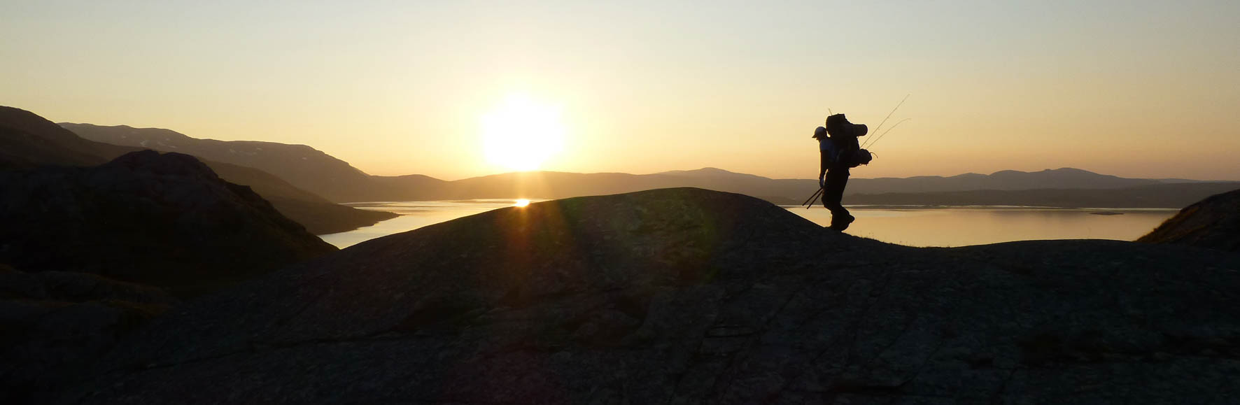 Foto: Per Ludvig Mosti